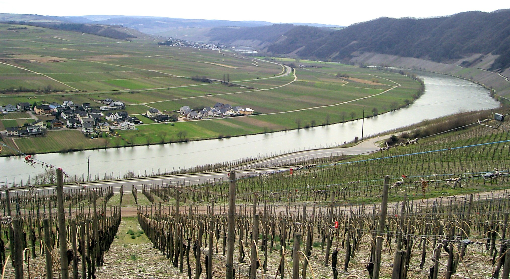 Blick auf Piesport-Ferres an der Mosel, Rheinland-Pfalz, Deutschland